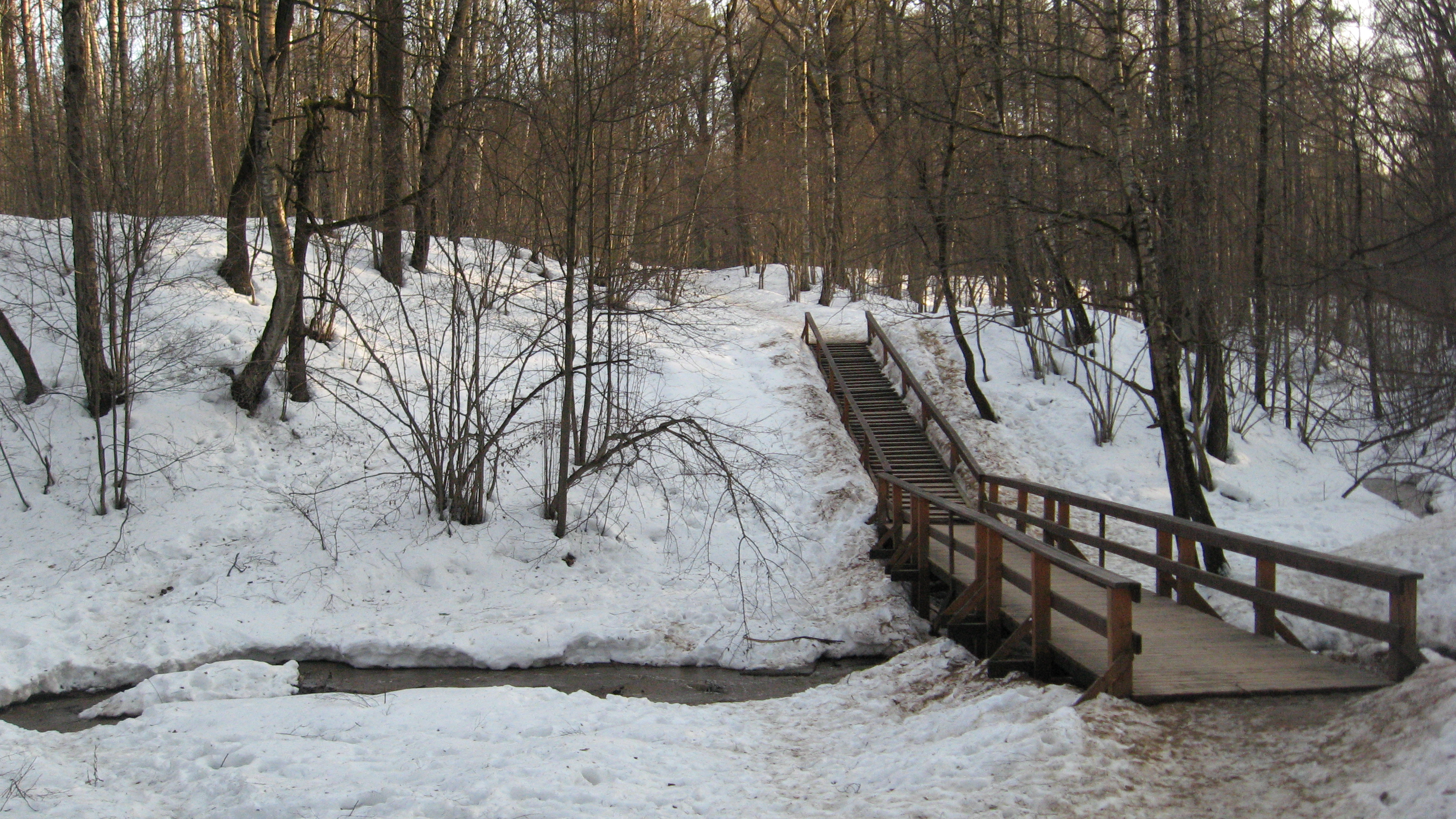 Мост через реку Городня в Битцевском лесопарке